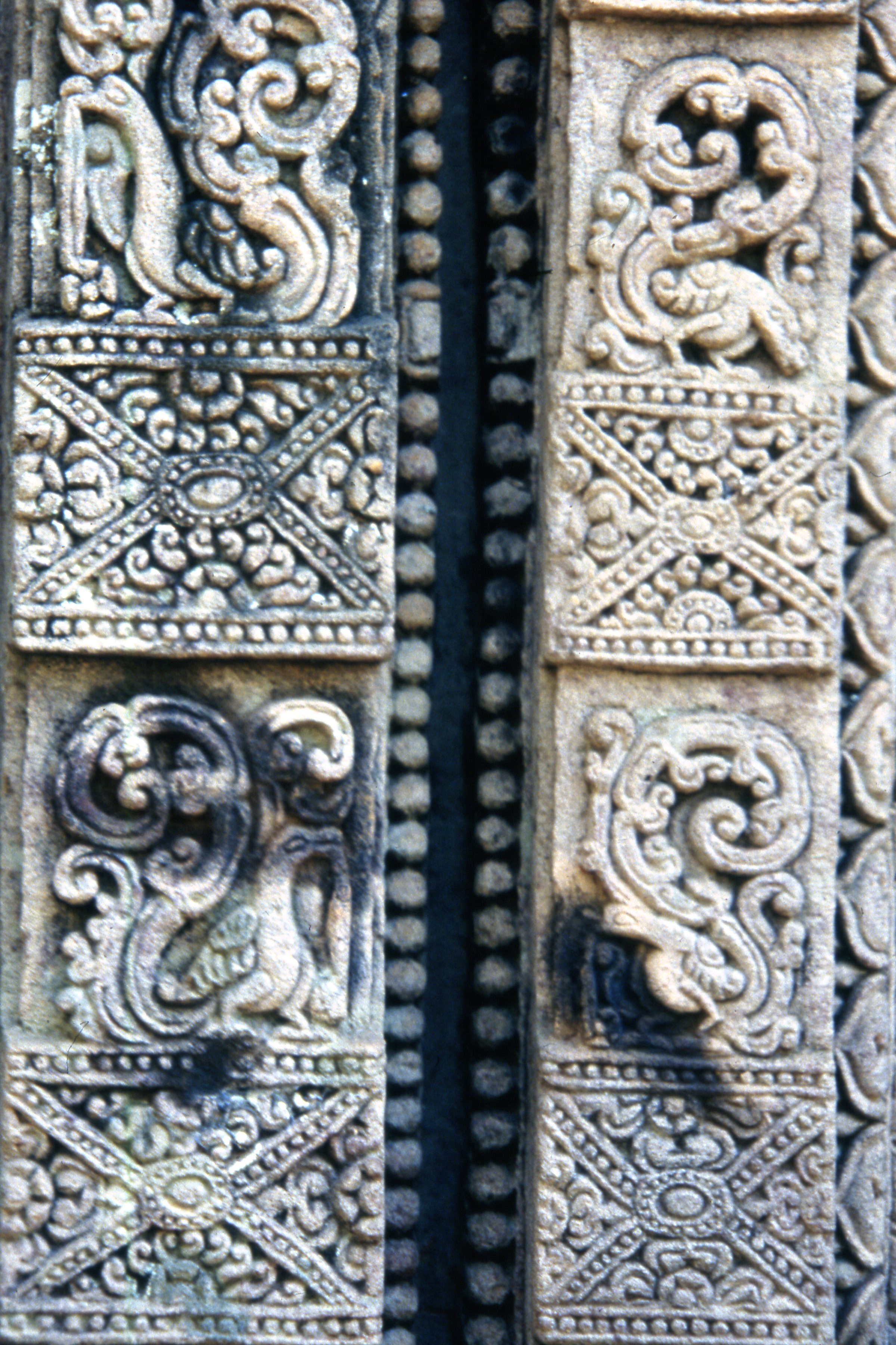 Siglo VII Templo Parasuramesvara , Detalle de grabados en un templo con motivos de aves decorados con guirnaldas, se trata de gansos celestiales conocidos como Hamsa. Orissa, Bhuvanesvar, India.